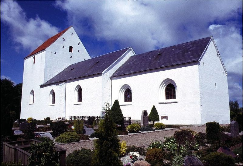 Tise Kirke i Danmark. Tise kirke